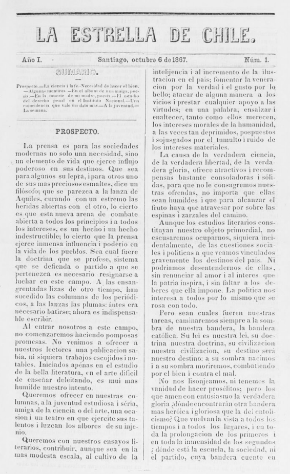 Portada del primer número de "La Estrella de Chile", 6 de octubre de 1867.